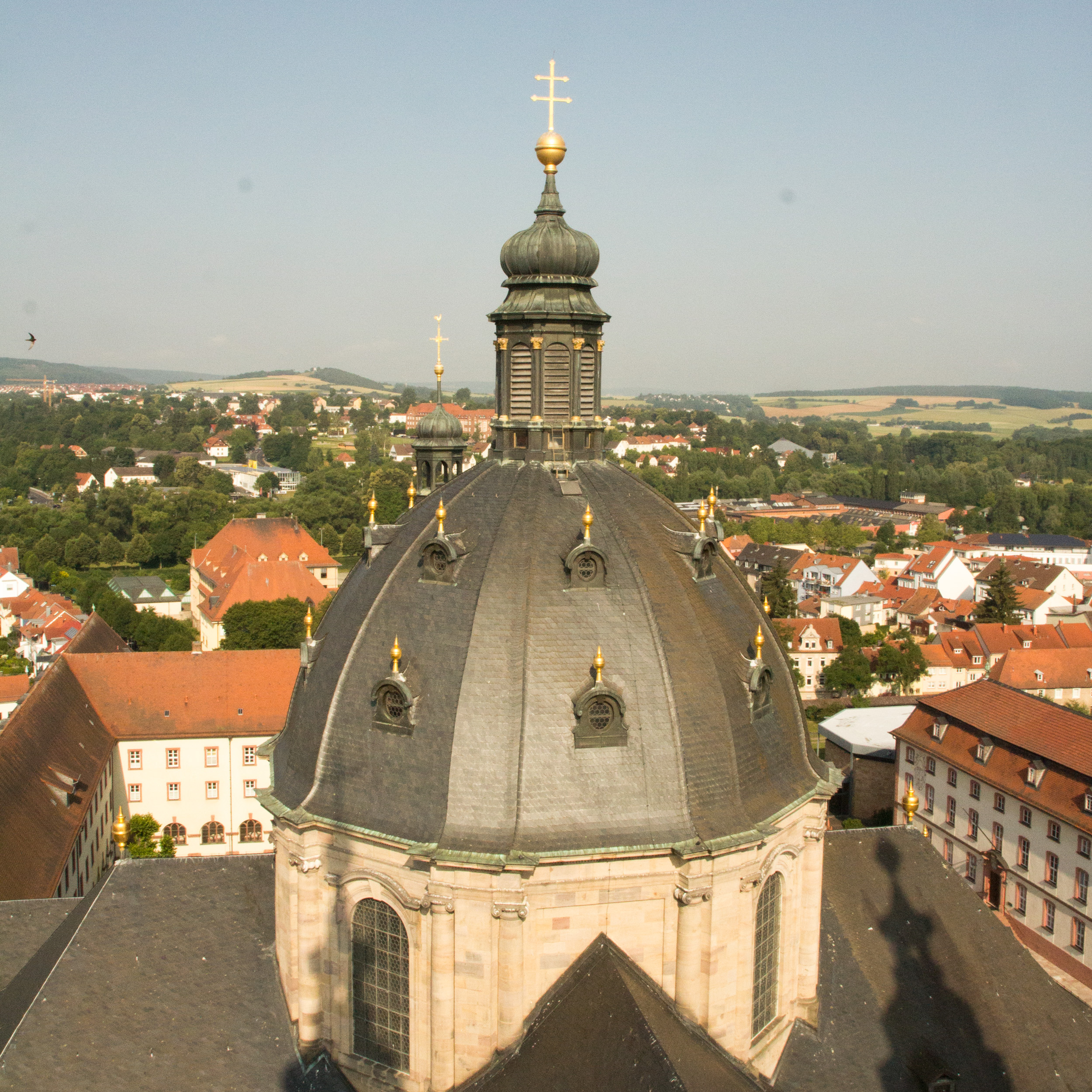 Blick vom Südturm